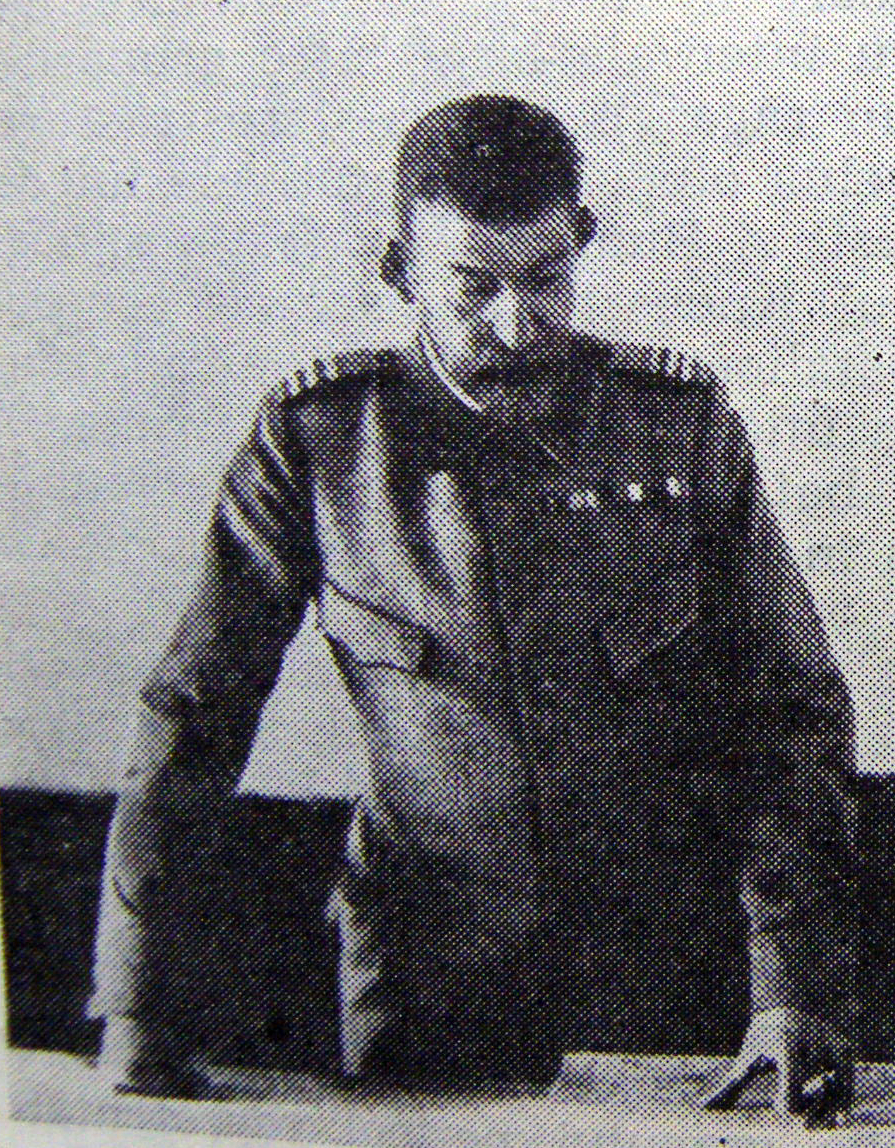 1916 - toamna - regele Ferdinand la sediul Marelui Cartier General din Peris, România